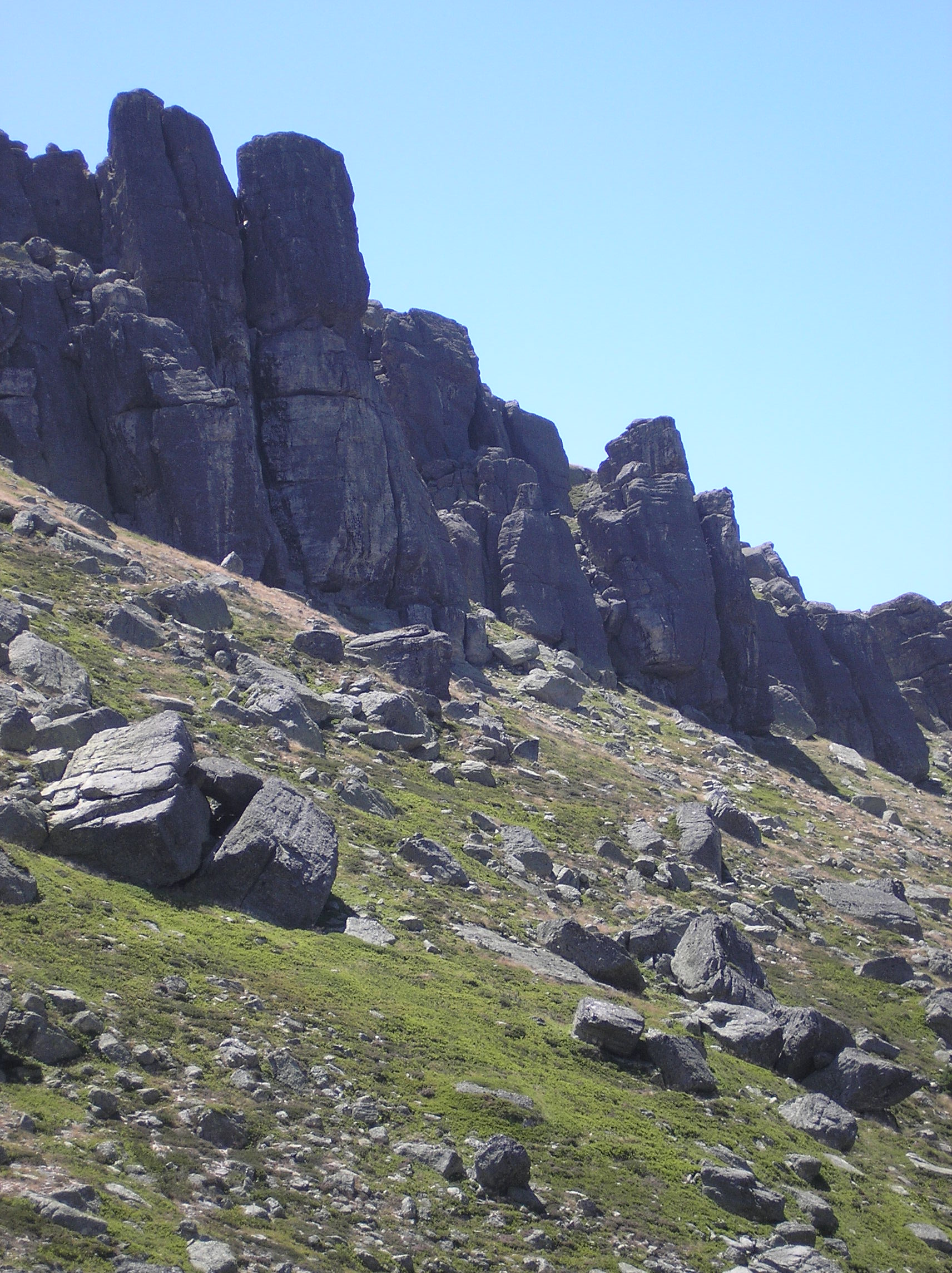 Picos de Urbión, province of Soria, in Castile and León, Spain.